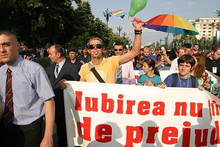 Bucharest's GayFest 2006 LGBT pride parade